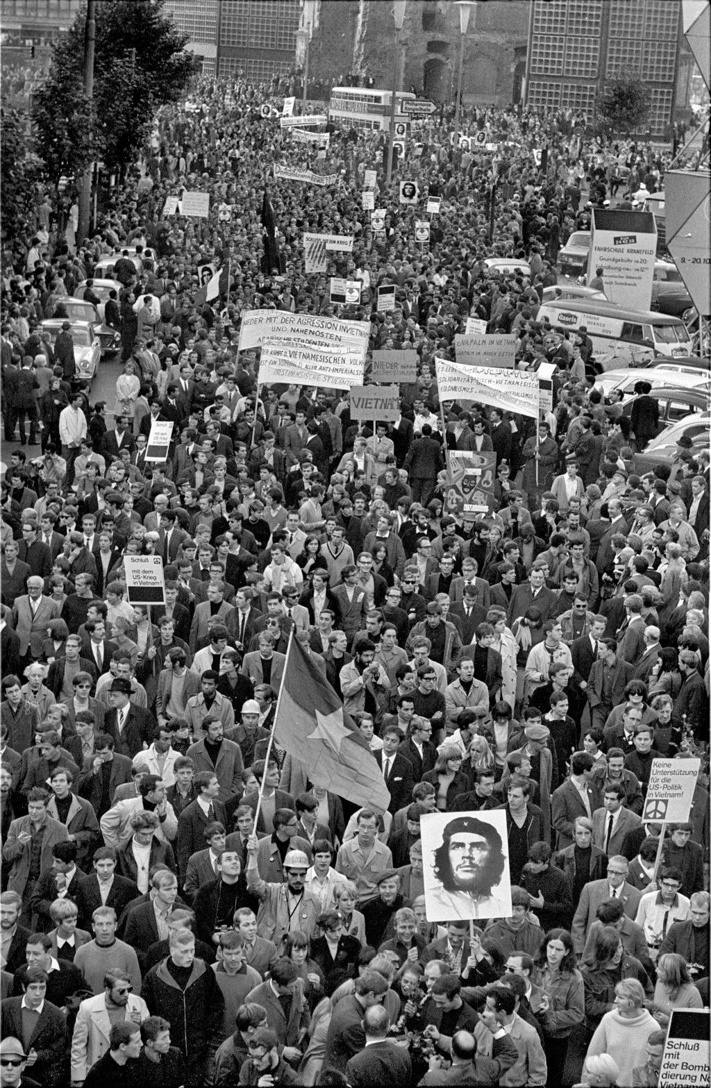 2001_03_0275.0011 Ludwig Binder: Studentenrevolte 1967/68, West-Berlin; veröffentlicht vom Haus der Geschichte